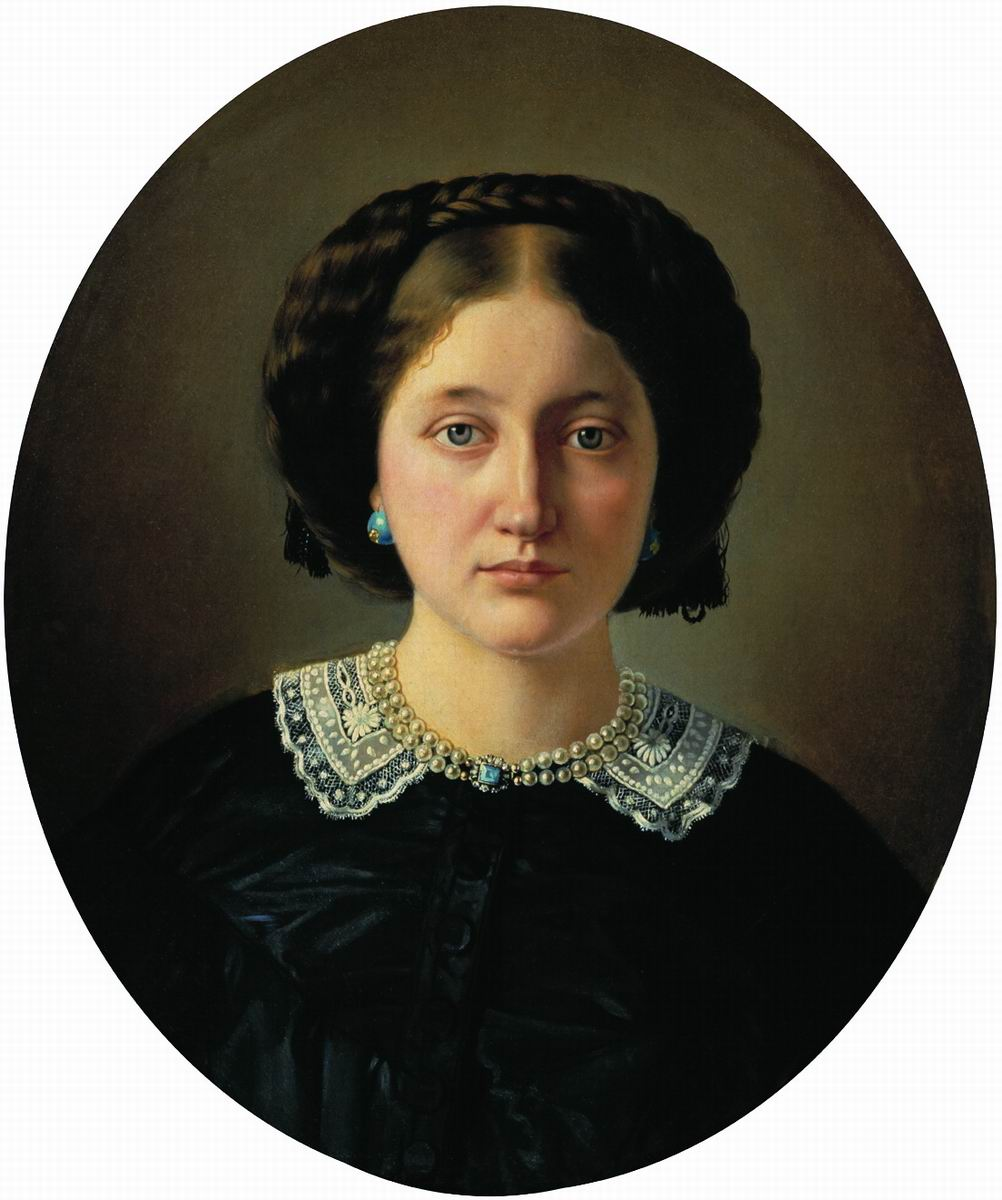 Портрет Варвары Александровны Иордан, урожденной Пущиной Не ранее 1855